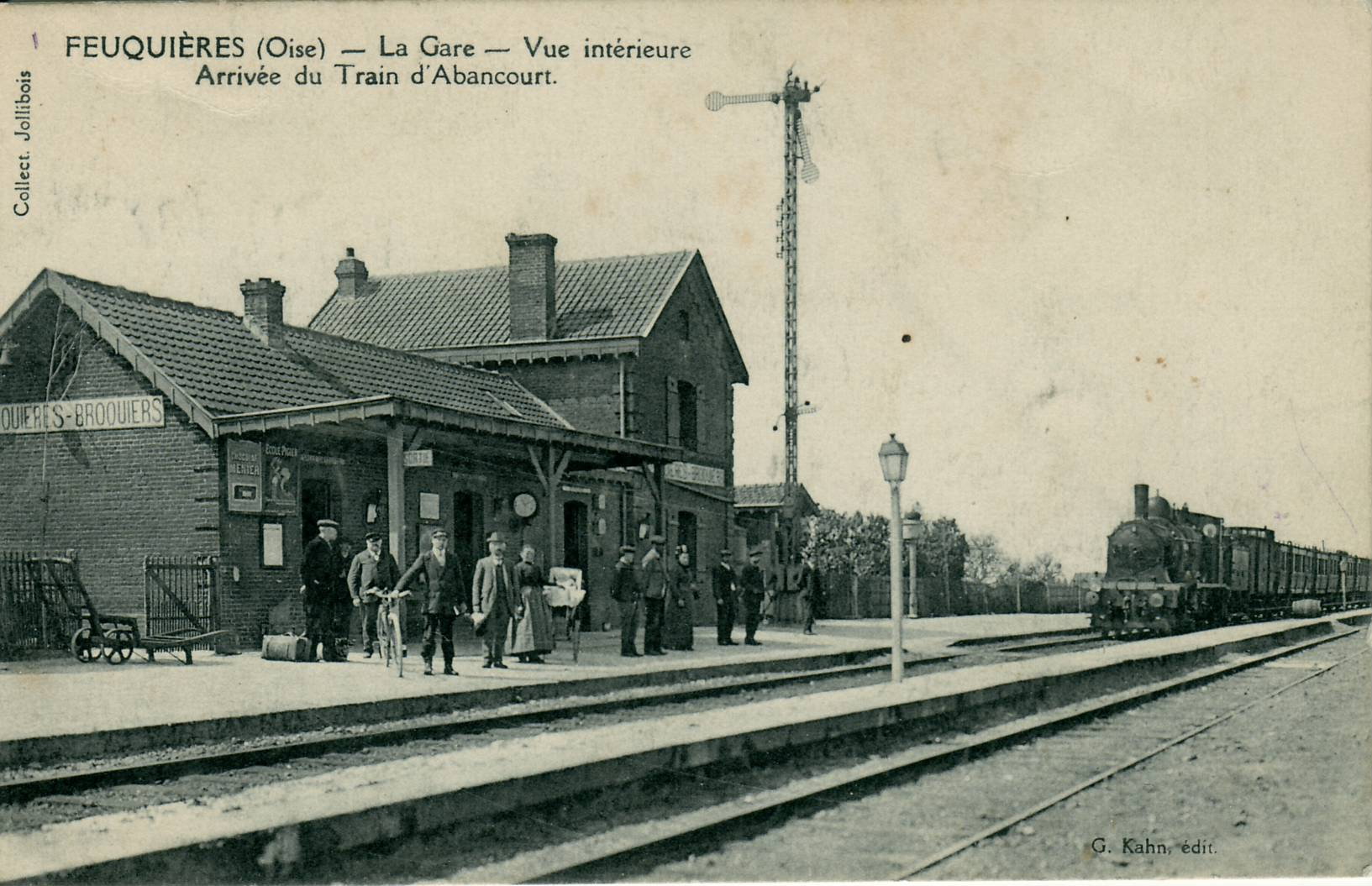 Carte postale ancienne éditée par G. Kahn - Collection Jolibois Feuquières (Oise) - La Gare - Arrivée du train d'Abancourt